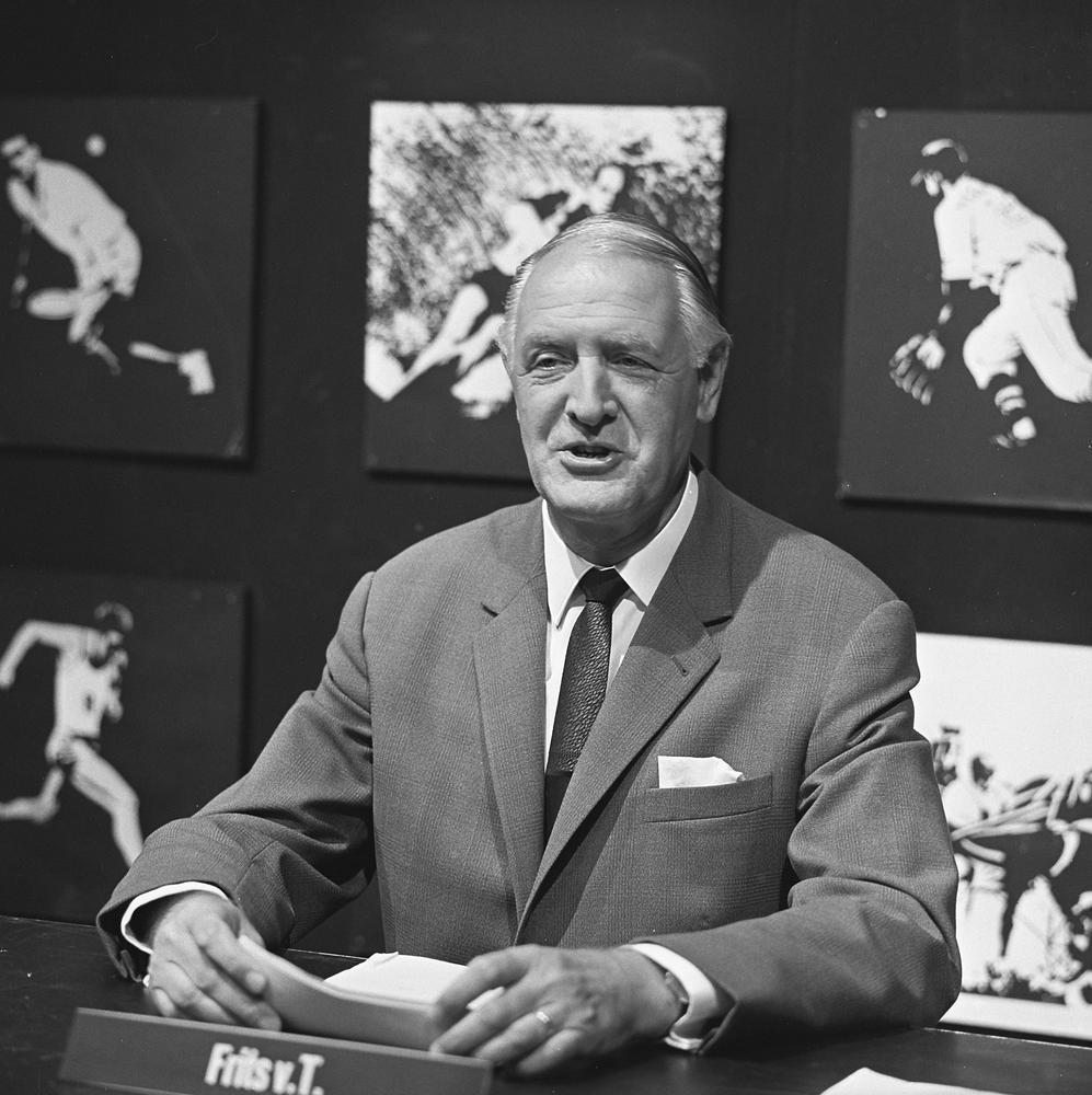 Frits van Turenhout in het televisieprogramma Een avondje teevee met André.